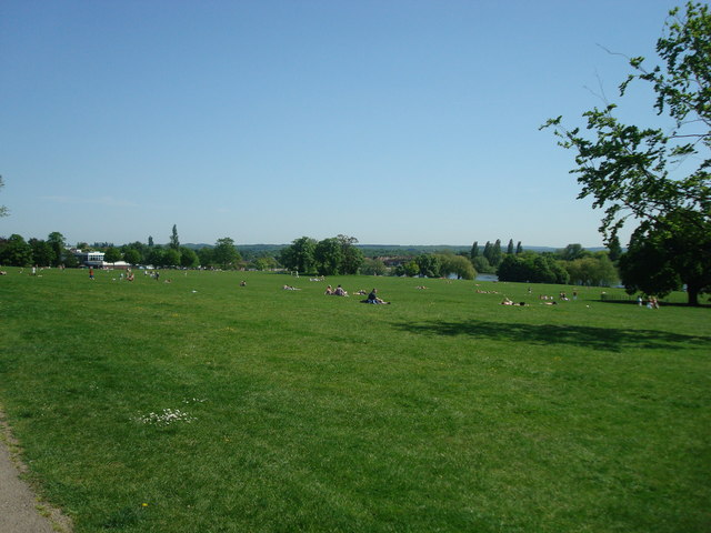 Danson Park